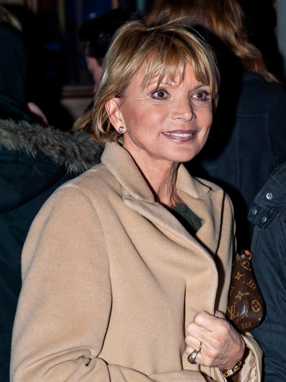 Uschi Glas, German actress, Berlinale 2012, ARD Degeto Blue Hour Party